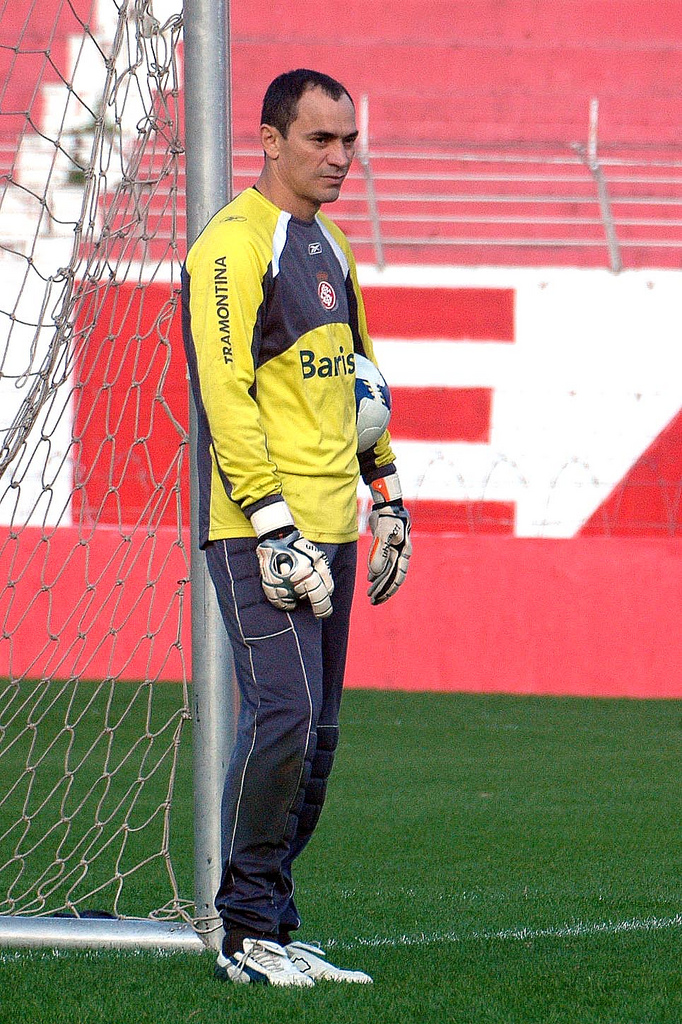 Clemer